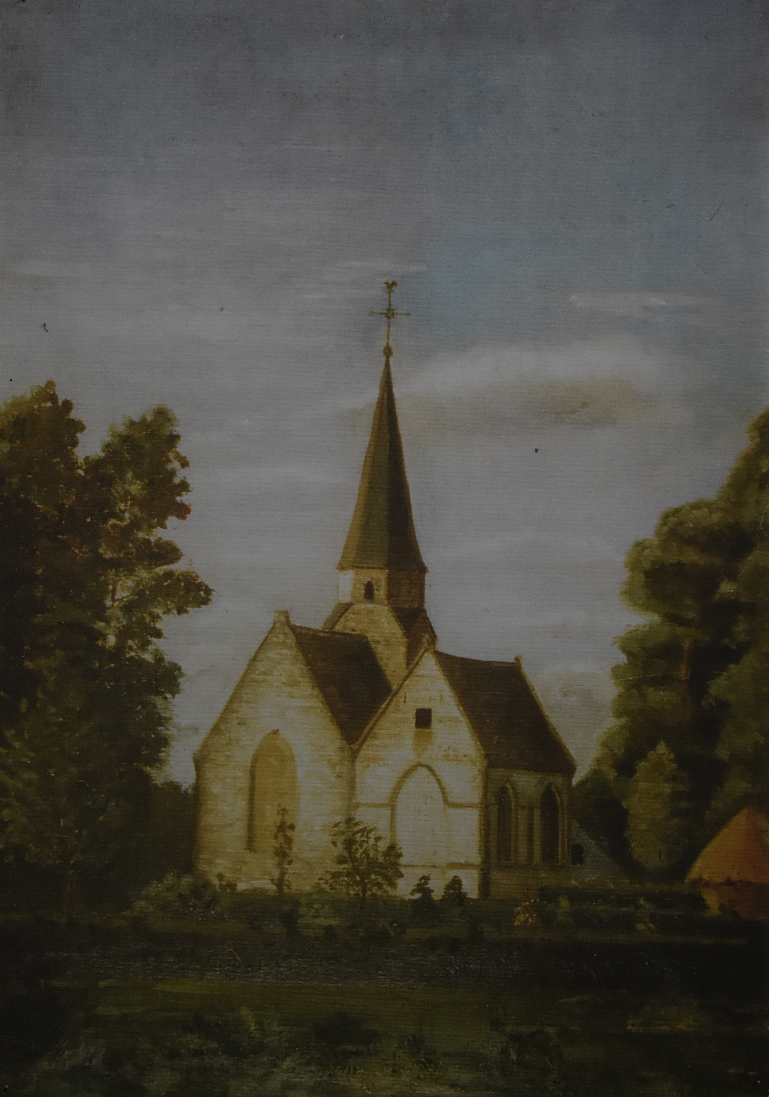 Voormalige Sint-Bonifatiuskerk (Munte) aan de Kerkenhoek (Torrekensstraat) - gesloopt einde 19e eeuw